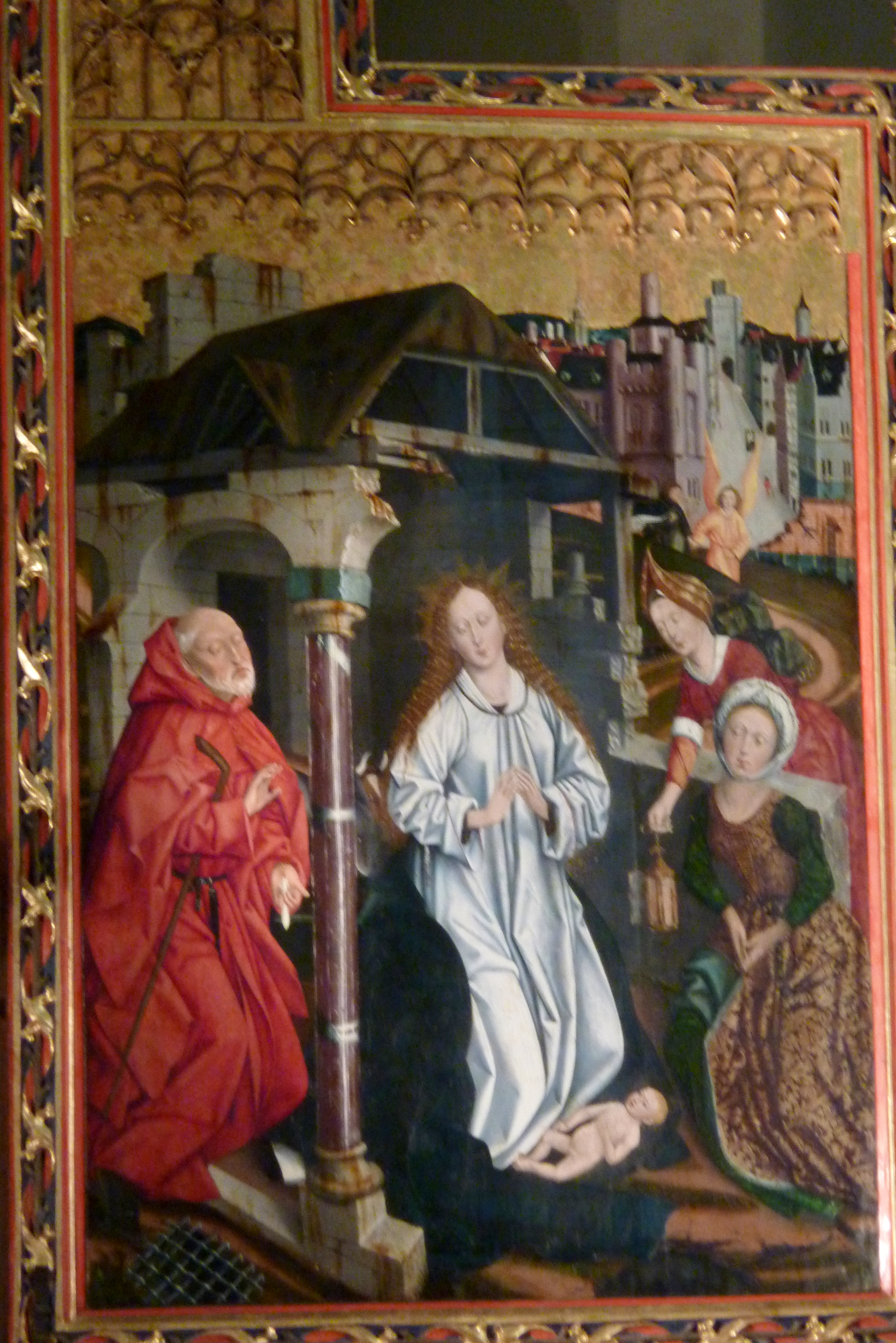 Evangelische Stadtkirche St. Blasius in Bopfingen, einer Stadt im Ostalbkreis (Baden-Württemberg), Flügelaltar von Friedrich Herlin (Tafelbilder), von 1472, linke Tafel der Innenseite, Darstellung: Geburt Christi